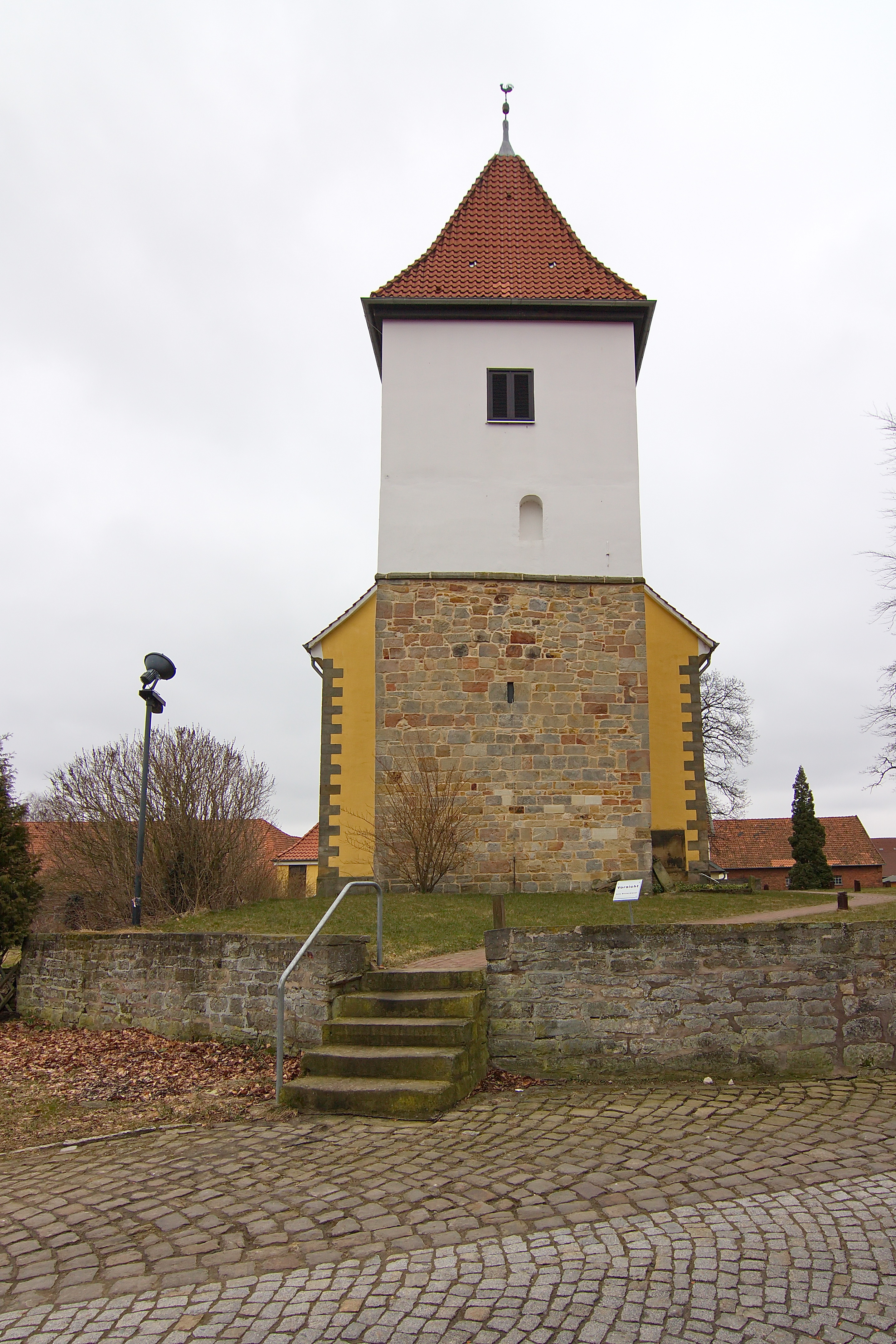 Dreieinigkeitskirche in Kirchwehren (Seelze)